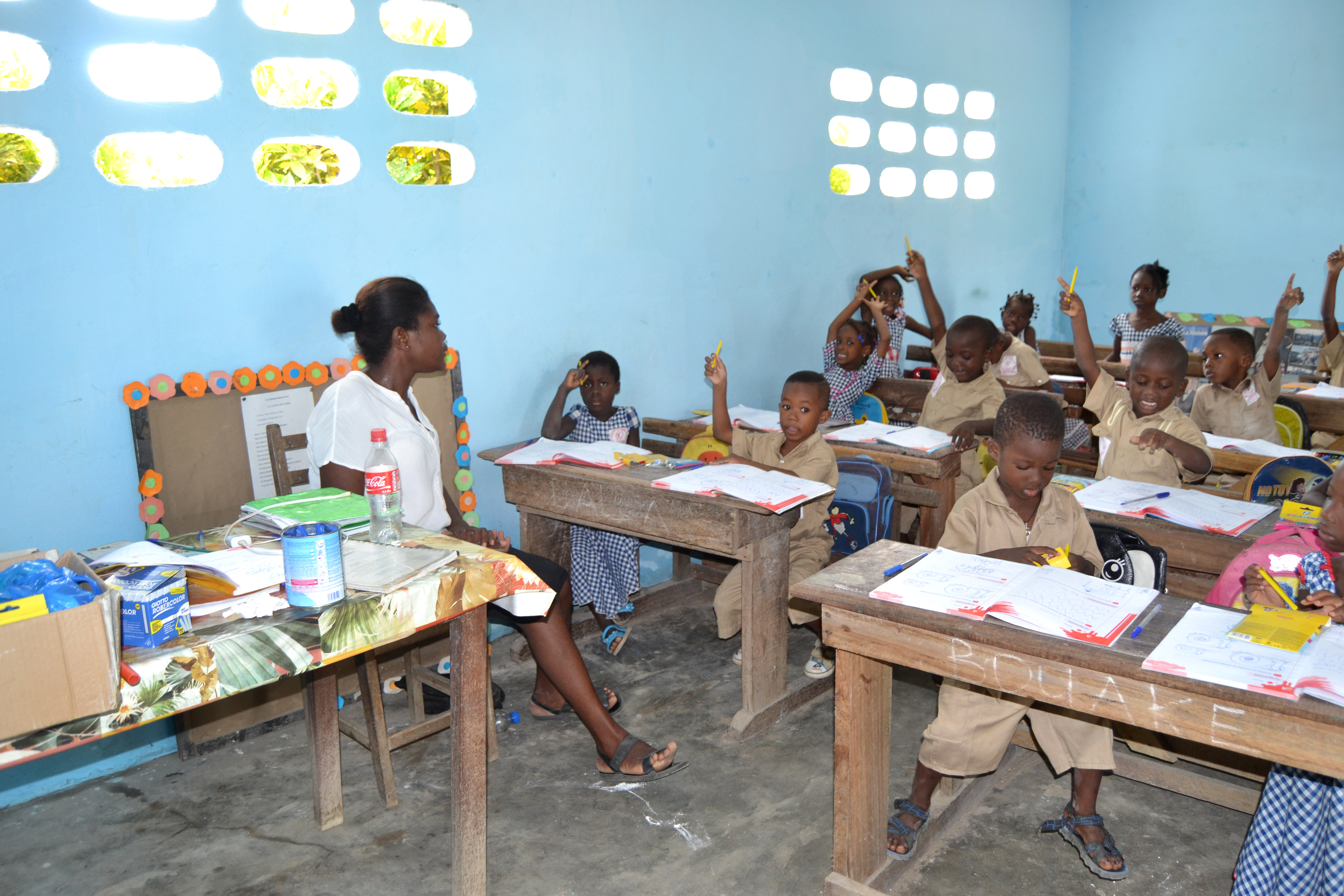 une Institutrice ivoirienne dispensant des cours dans une classe de CP1 à Abidjan (Côte d'Ivoire)